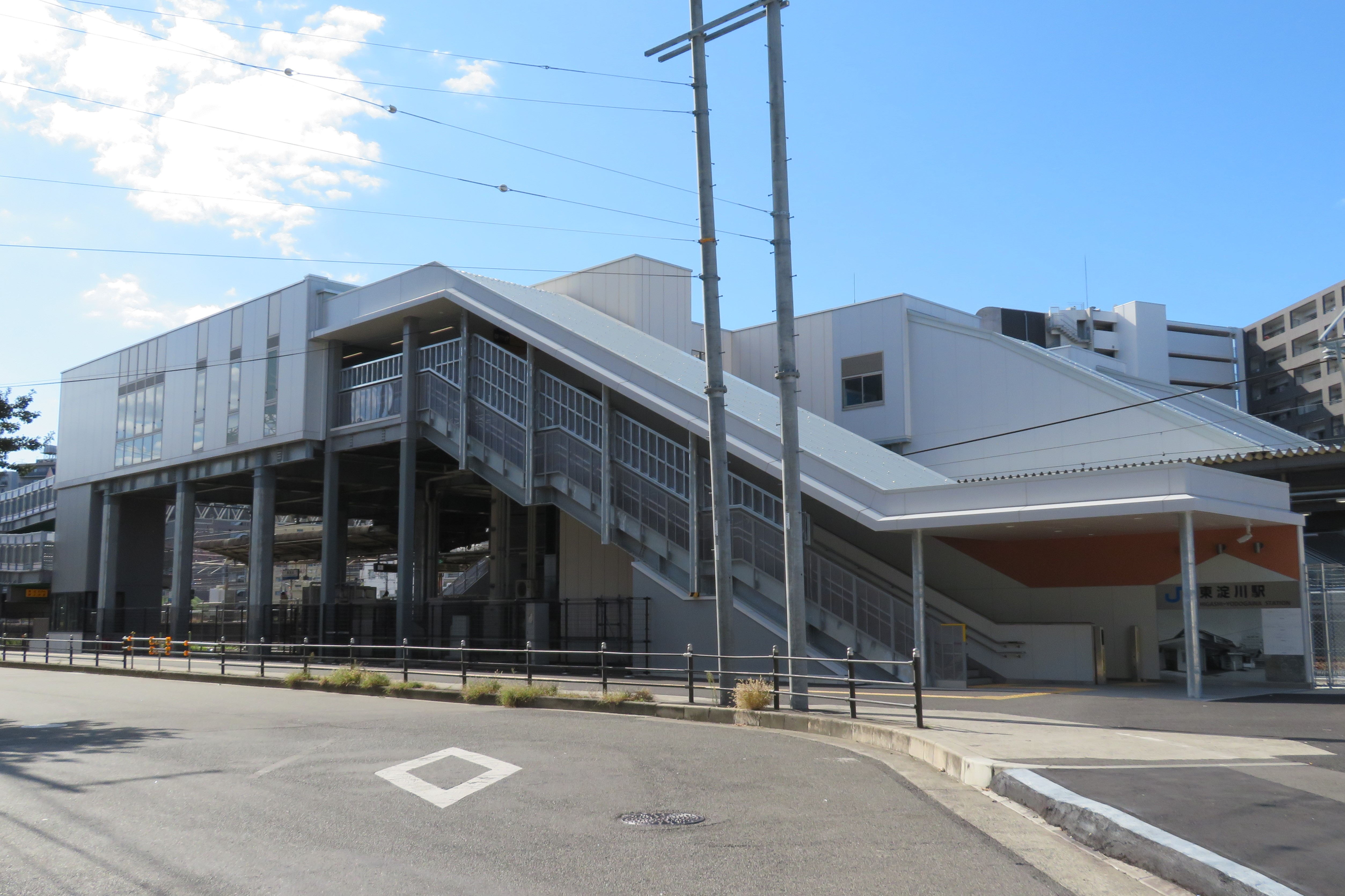 JR東淀川駅東口